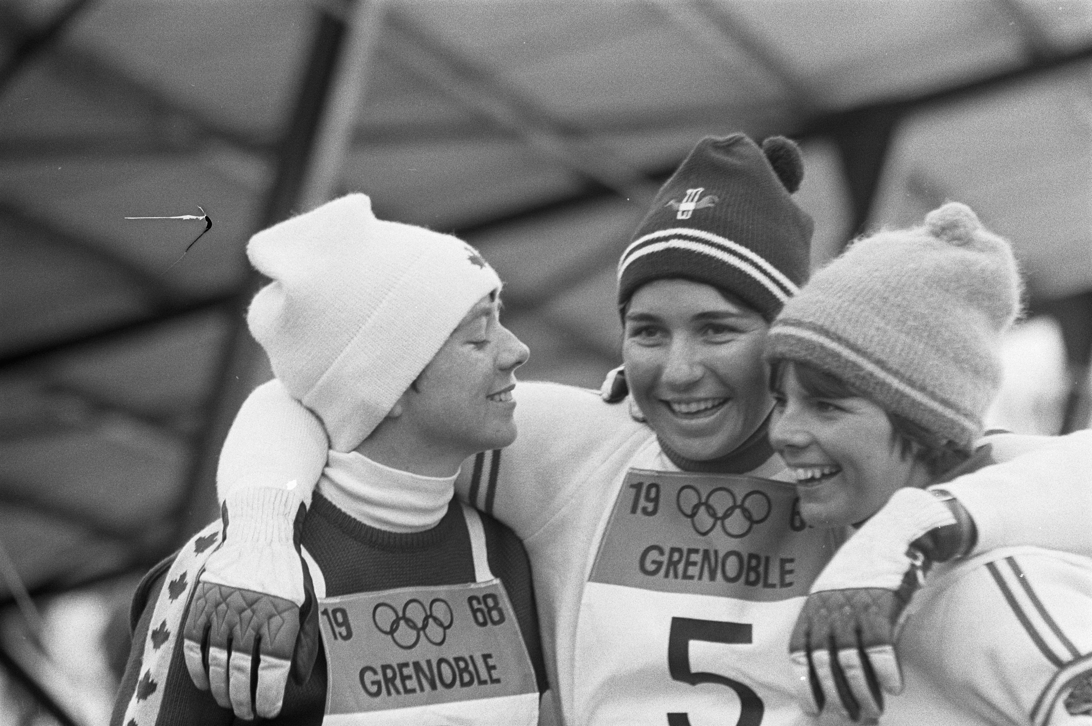 Collectie / Archief : Fotocollectie Anefo Reportage / Serie : [ onbekend ] Beschrijving : Olympische Spelen Grenoble, ski-slalom dames, v.l.n.r. Nancy Green (Canada, rechts, 2e), Marielle Goitschel (Frankrijk, midden, winnares) en Annie Famose (Frankrijk, 3e) Datum : 13 februari 1968 Locatie : Frankrijk, Grenoble Trefwoorden : skien, sport Persoonsnaam : Famose Annie, Goitschel Marielle, Green Nancy Fotograaf : Kroon, Ron / Anefo Auteursrechthebbende : Nationaal Archief Materiaalsoort : Negatief (zwart/wit) Nummer archiefinventaris : bekijk toegang 2.24.01.05 Bestanddeelnummer : 921-0886